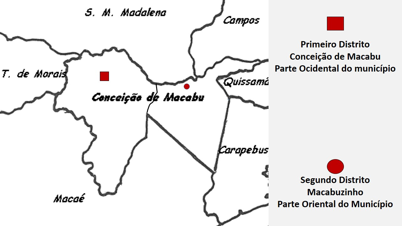 Território do município de Conceição de Macabu em sua divisão distrital: Conceição de Macabu, distrito sede ou 1º distrito; Macabuzinho, segundo distrito.